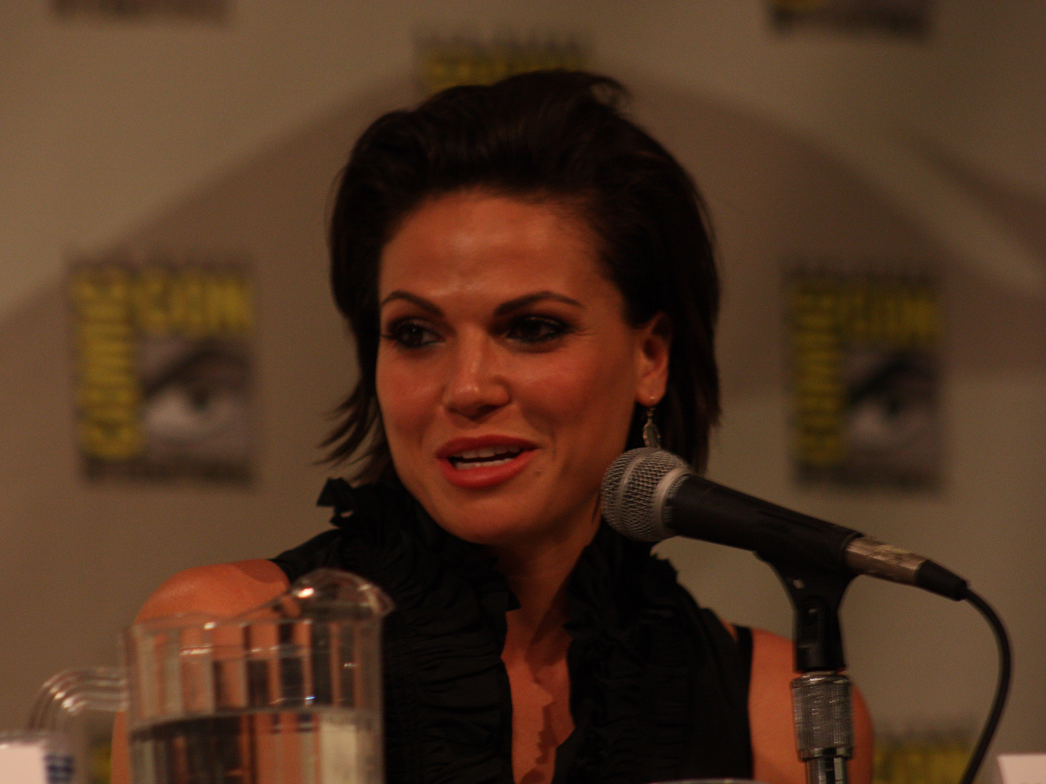 Actress Lana Parrilla at 2011 Comic-Con